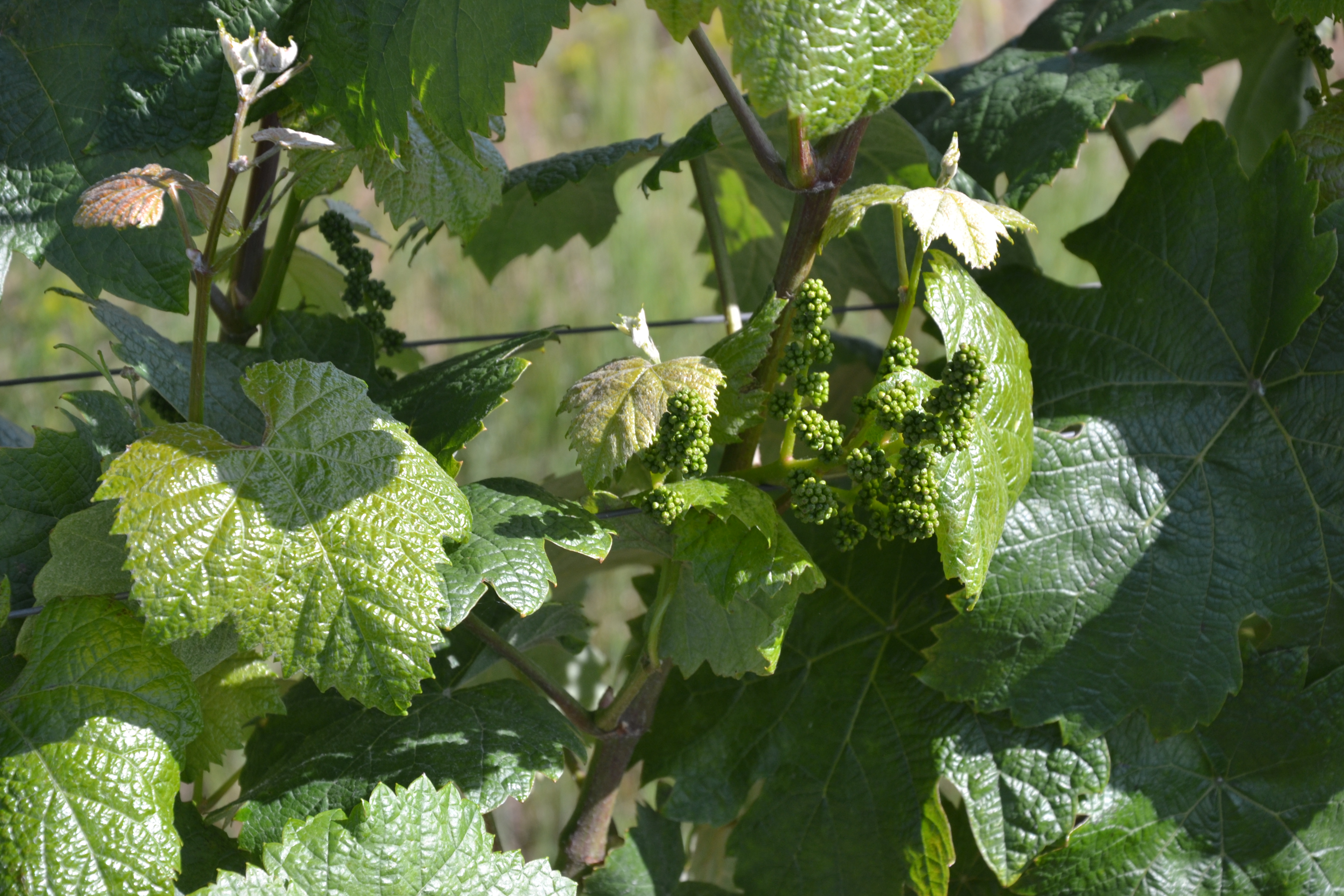 Formation d'une grappe dans une vigne de l'AOC Madiran